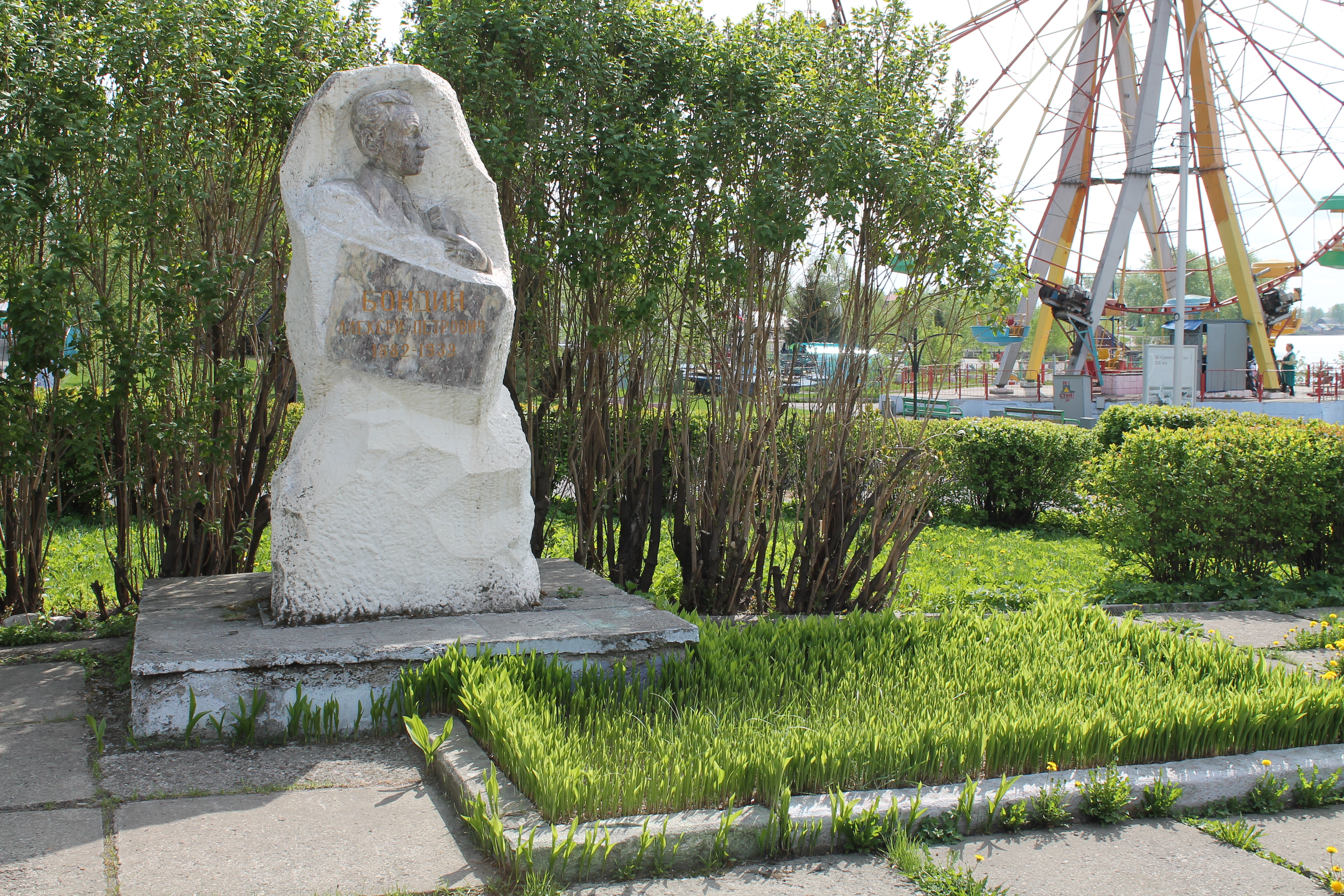 Нижний Тагил, ПКиО им. А.П.Бондина